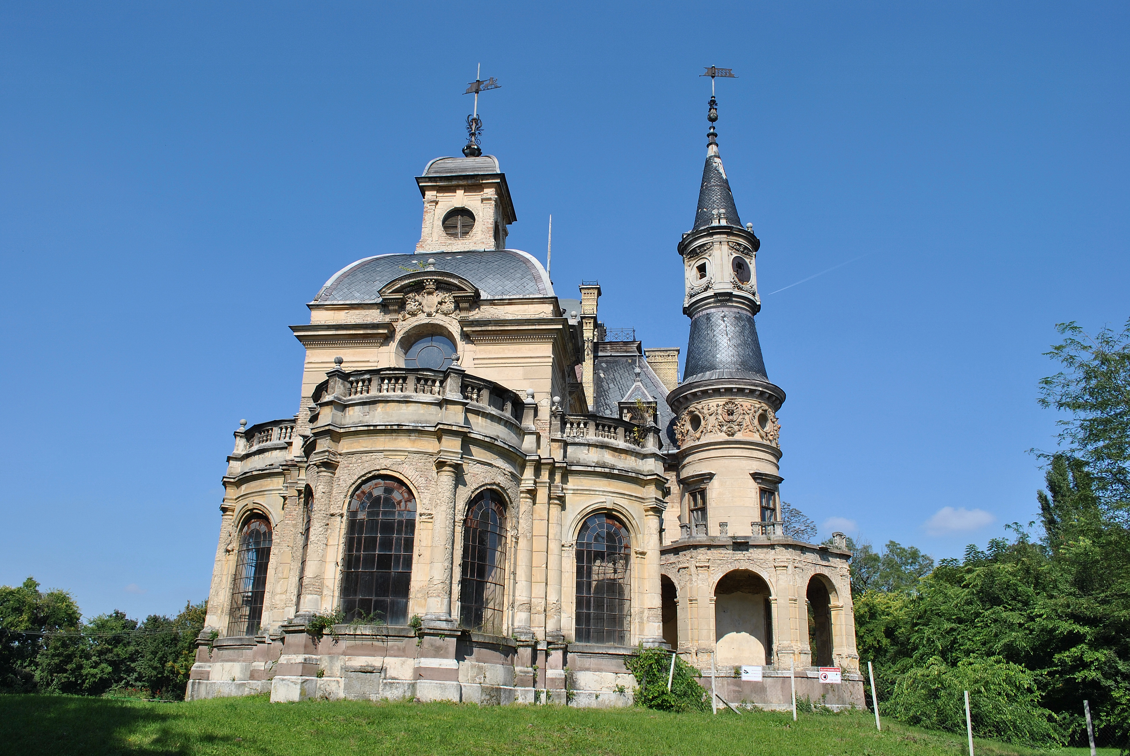 Schossberger-kastély (Tura, Kossuth u.) This is a photo of a monument in Hungary. Identifier: 7474